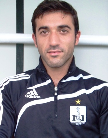 футболист Рашад Абдуллаев (Азербайджан)